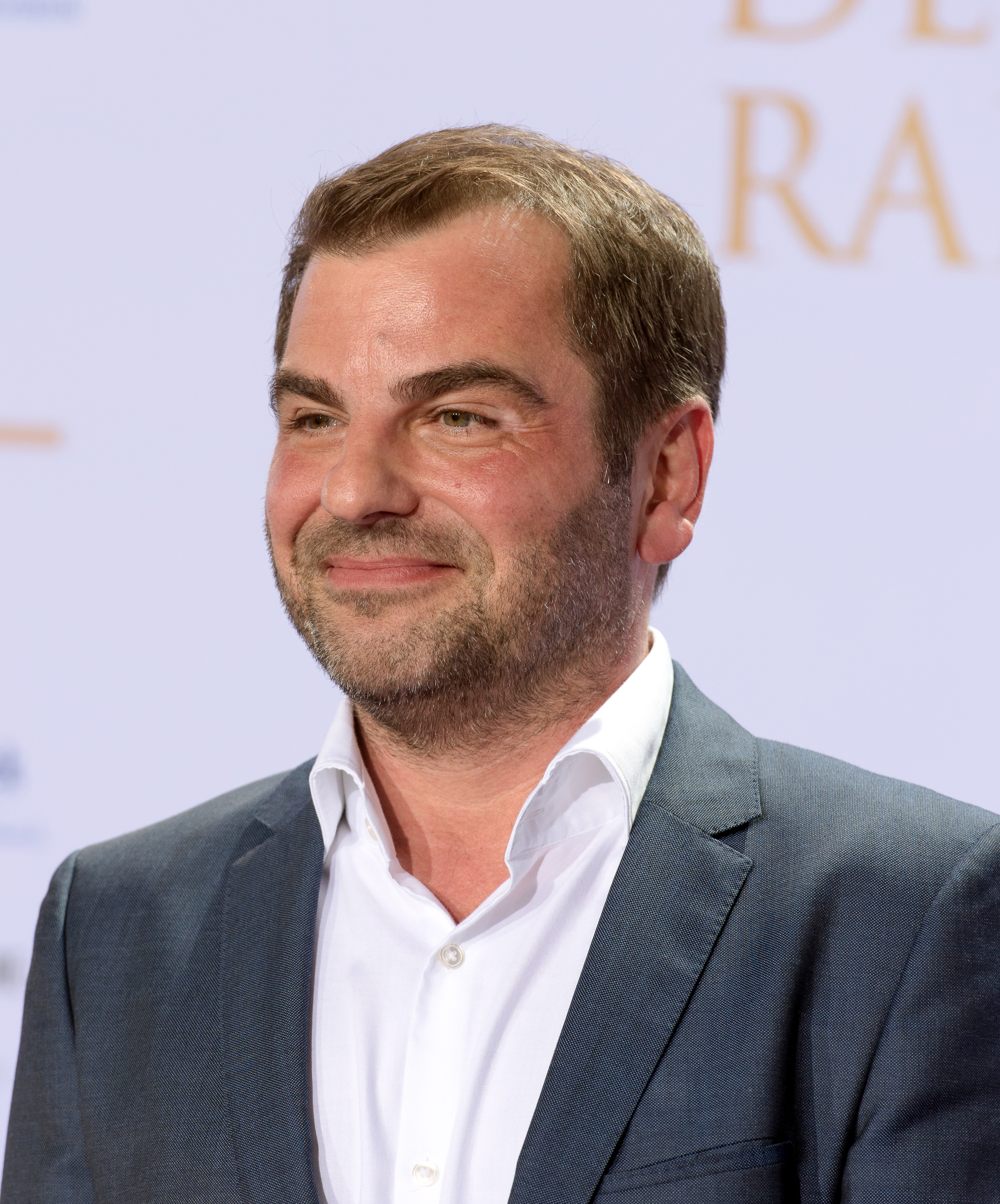 Andreas Altenburg beim Deutschen Radiopreis 2016 im Schuppen 62 in Hamburg